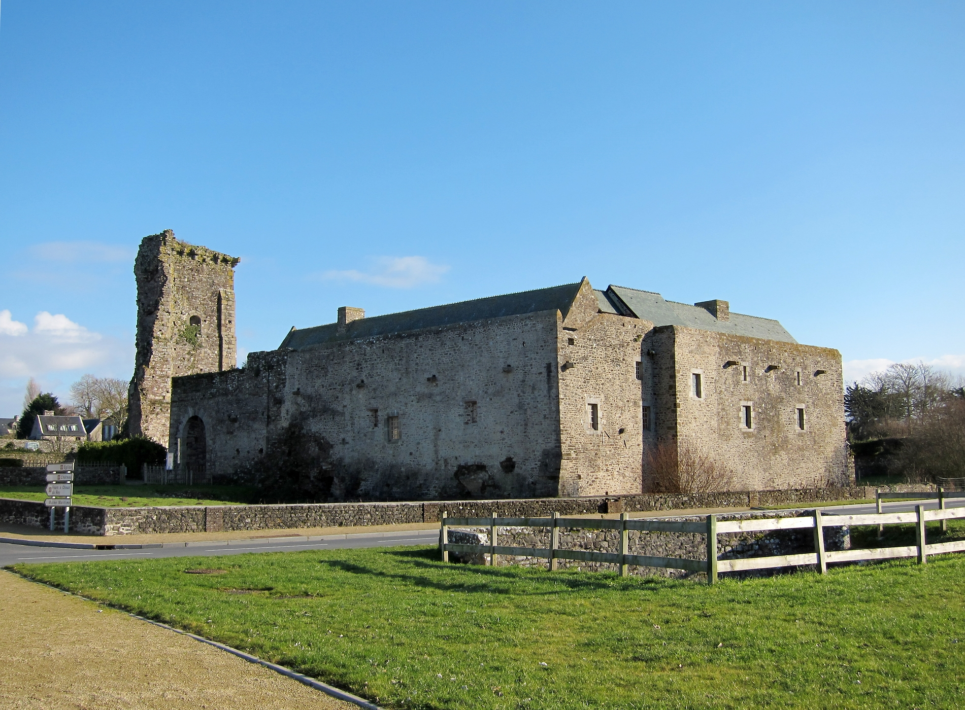 Le Château de Regnéville-sur-Mer (Manche).